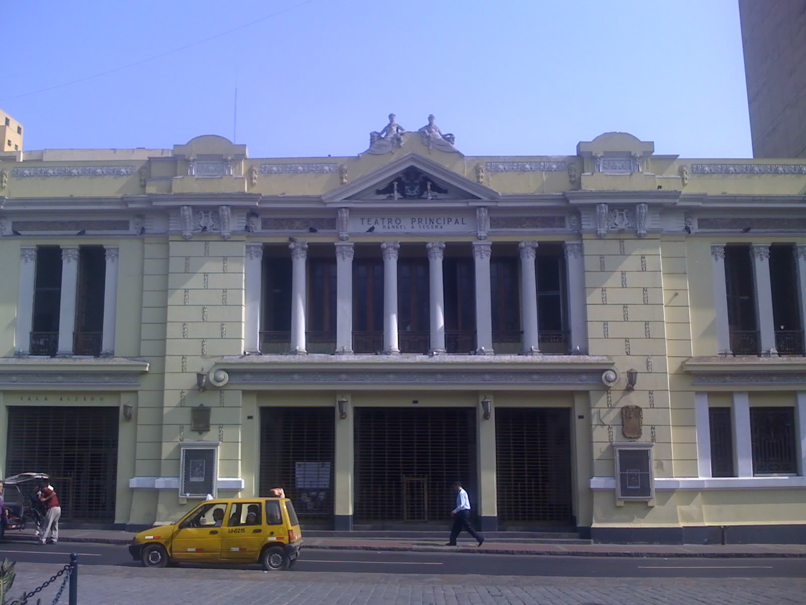 Frontis del Teatro Segura, Lima, Perú